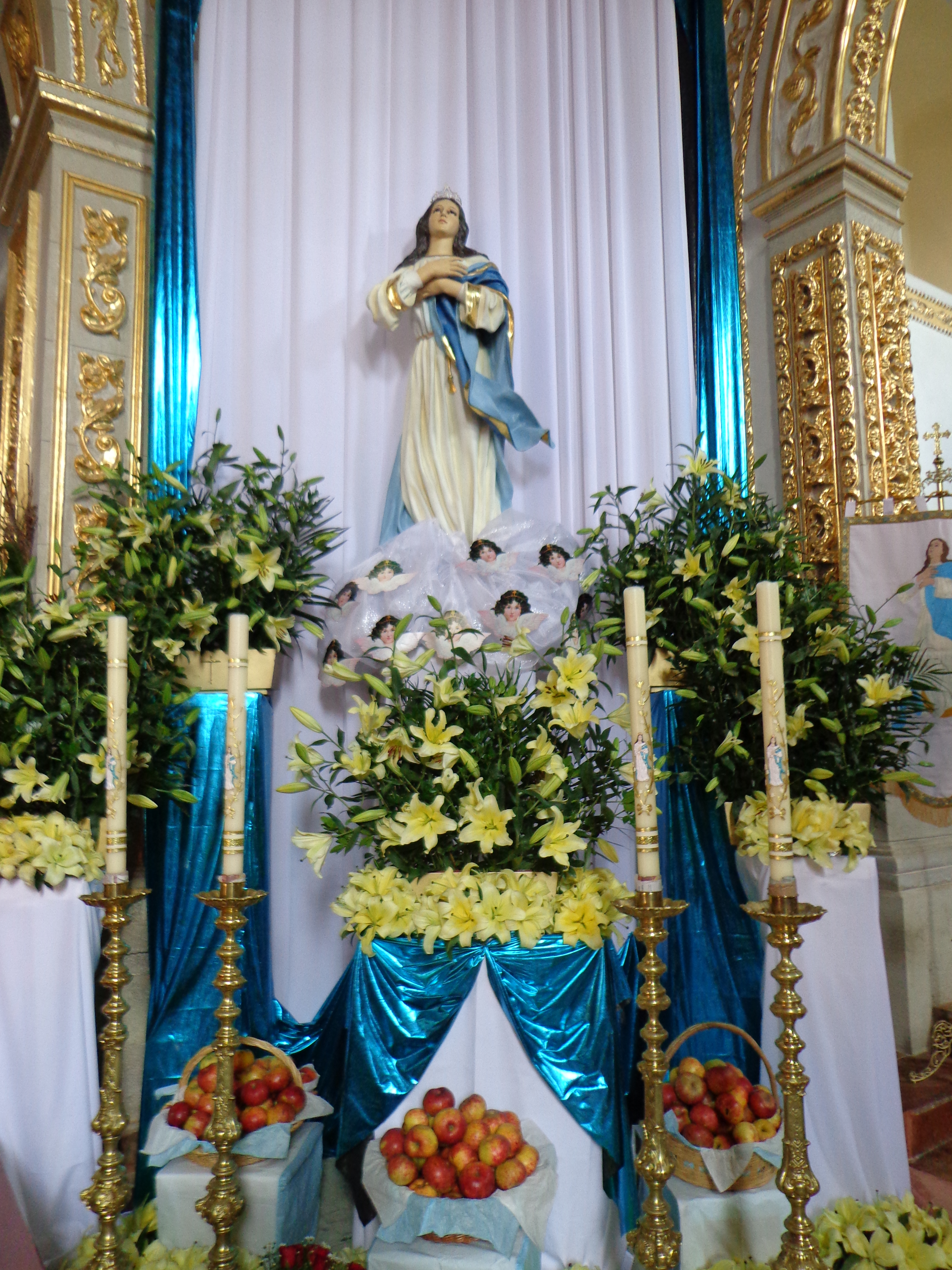 Foto de la fiesta patronal de Acaxochitlán Hidalgo en honor a la Asunción de María